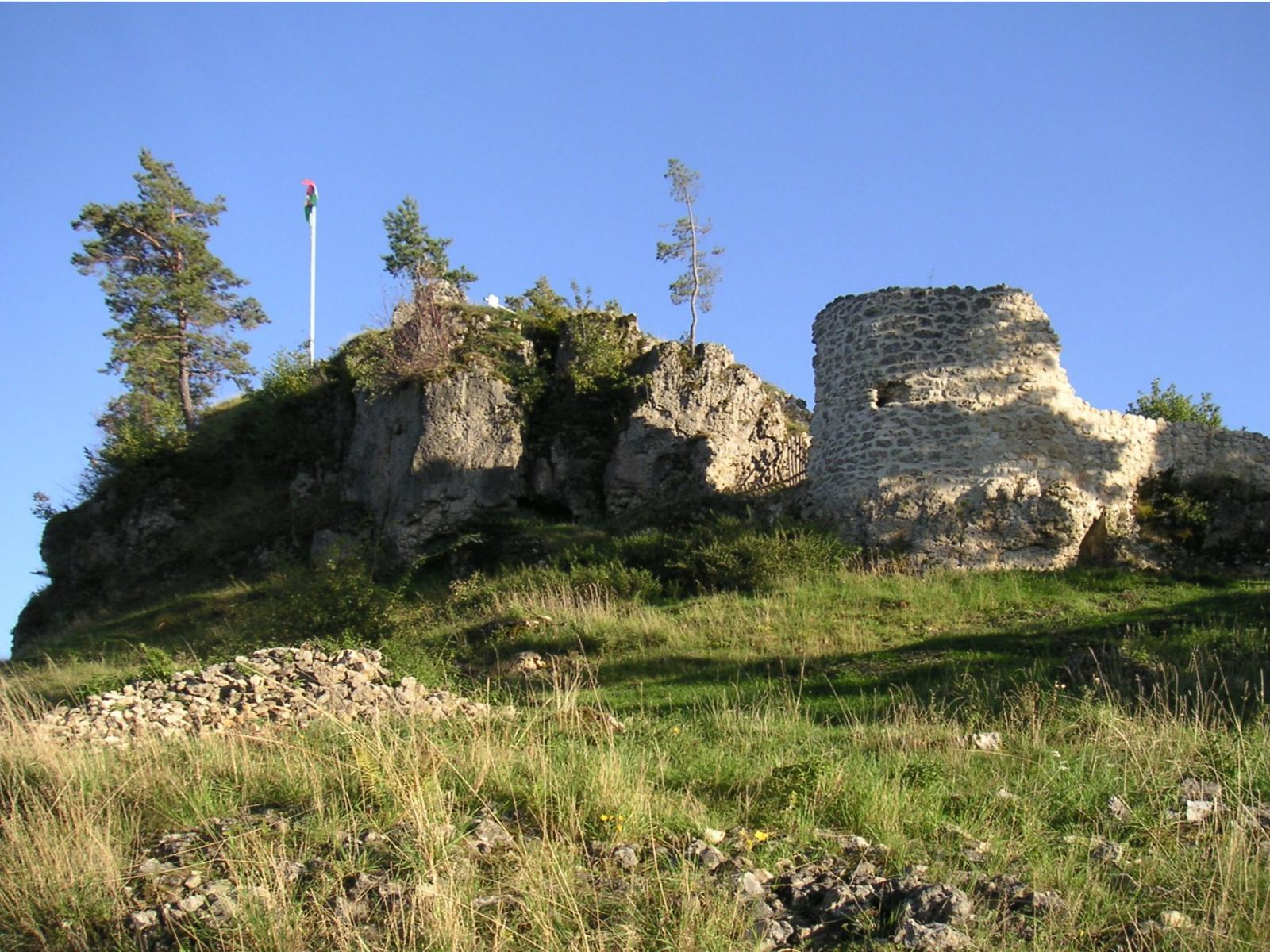 Burgruine Lichtenegg Nahaufnahme